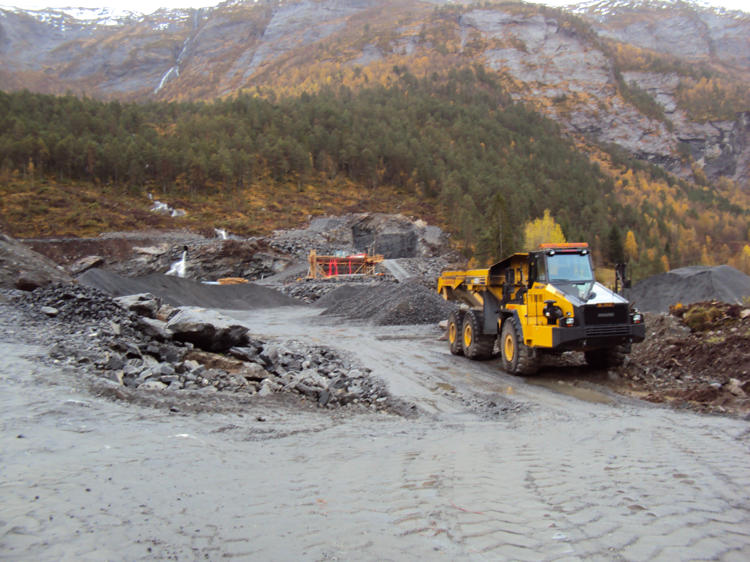 Kvivsveiutbygging